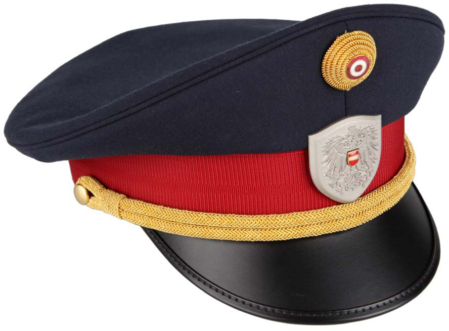 Oberbekleidungssorten der Bundespolizei und des rechtskundigen Dienstes bei den Sicherheitsbehörden Tellerkappe, blau - E2a